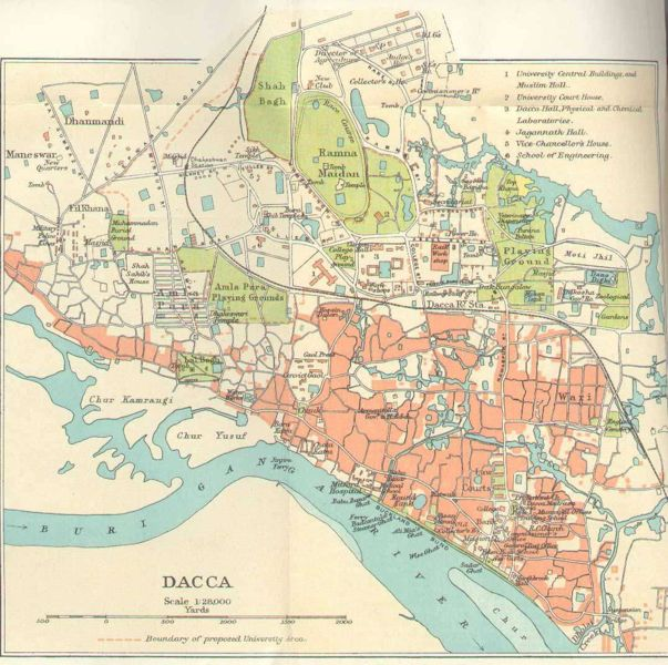 Dhaka during British rule 1924 Mughal period